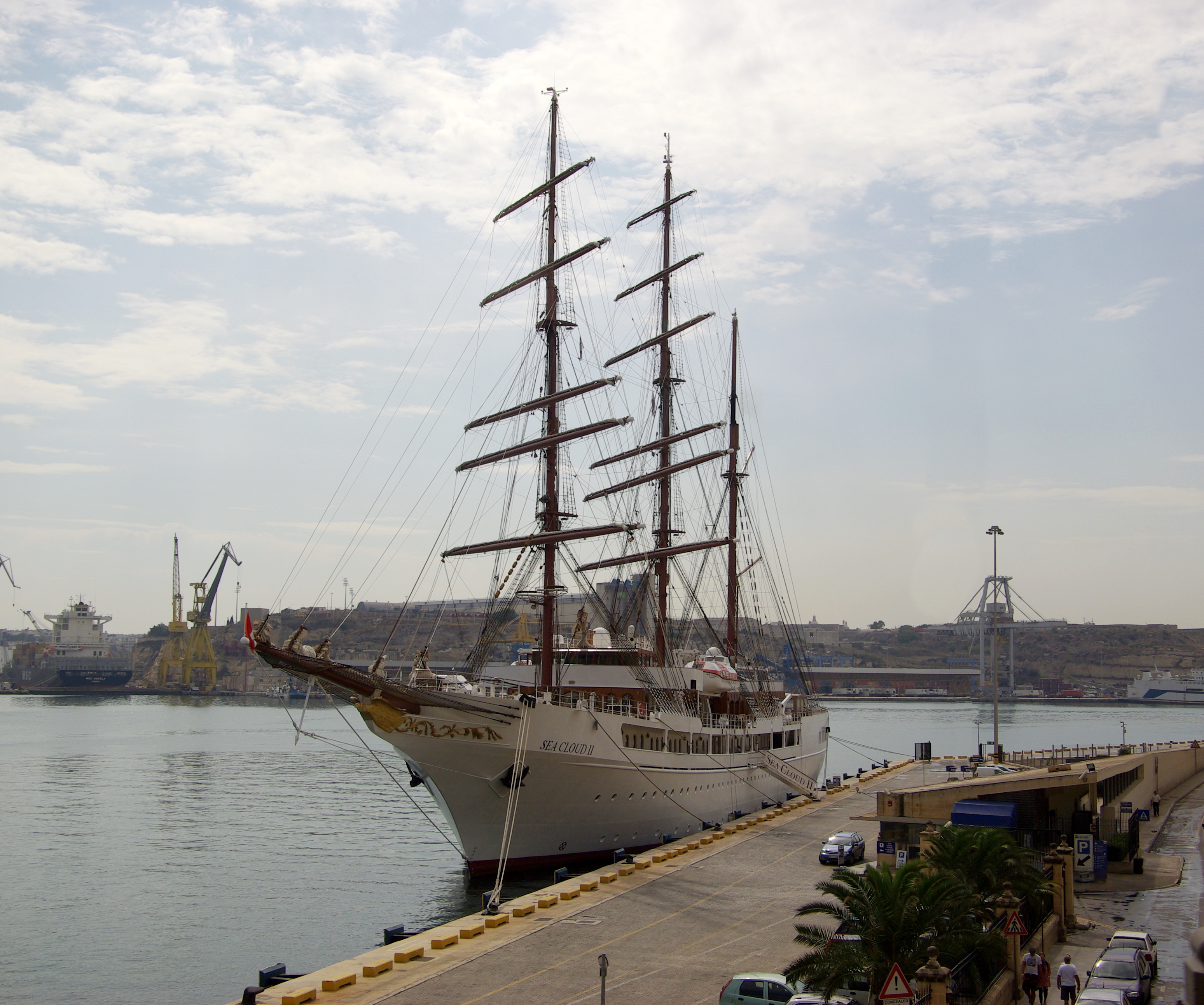 Die Sea Cloud II im Grand Harbour in Valetta, Malta